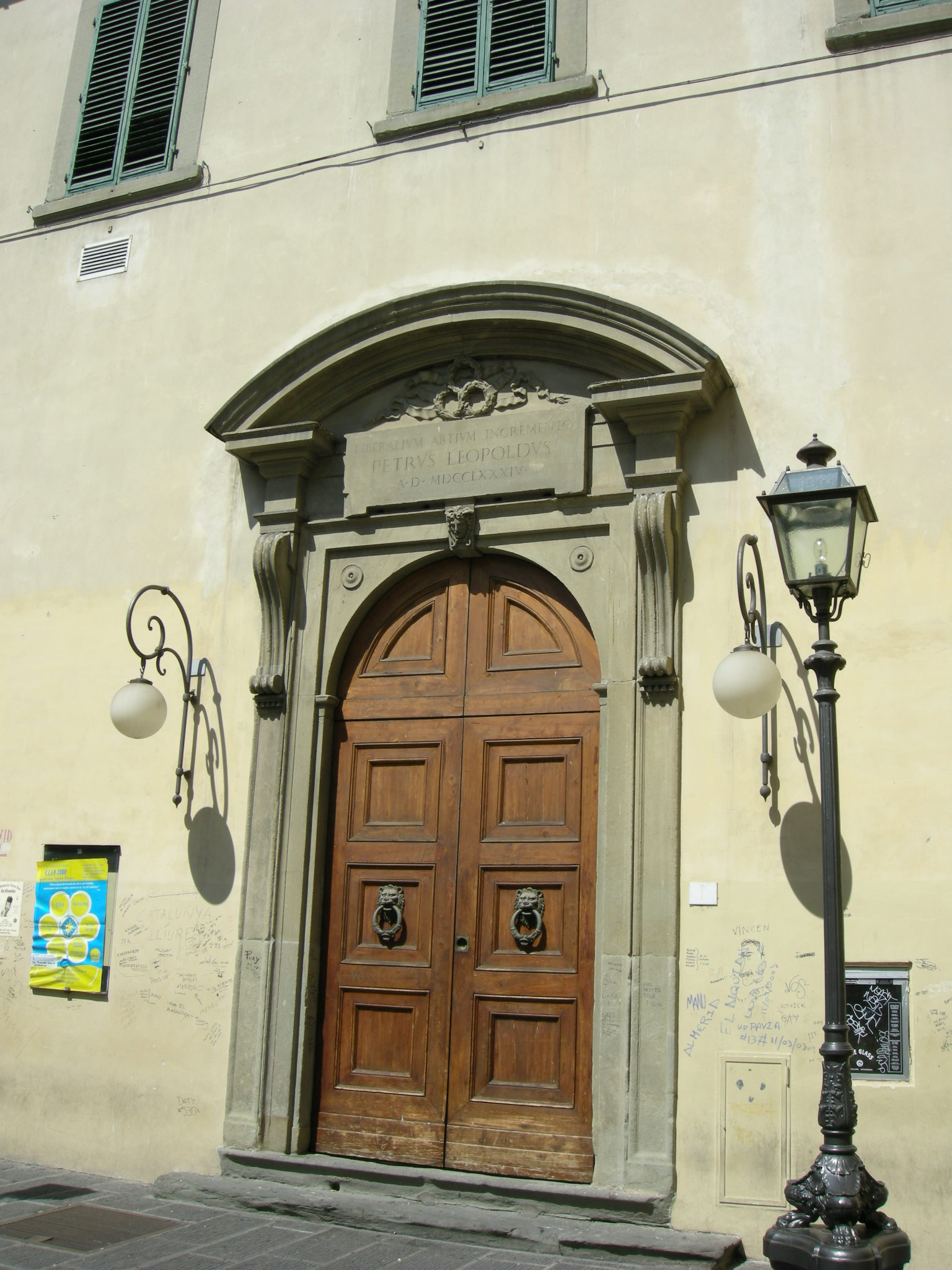 Conservatorio luigi cherubini, portale